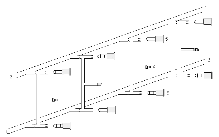 vacuum gas manifold